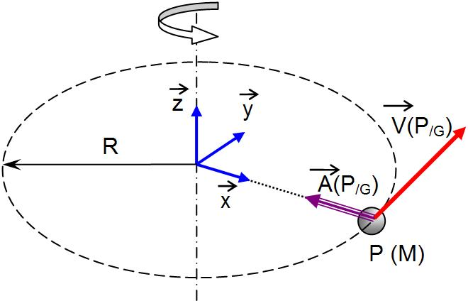 Description des paramètres cinématiques dans un mouvement de rotation.